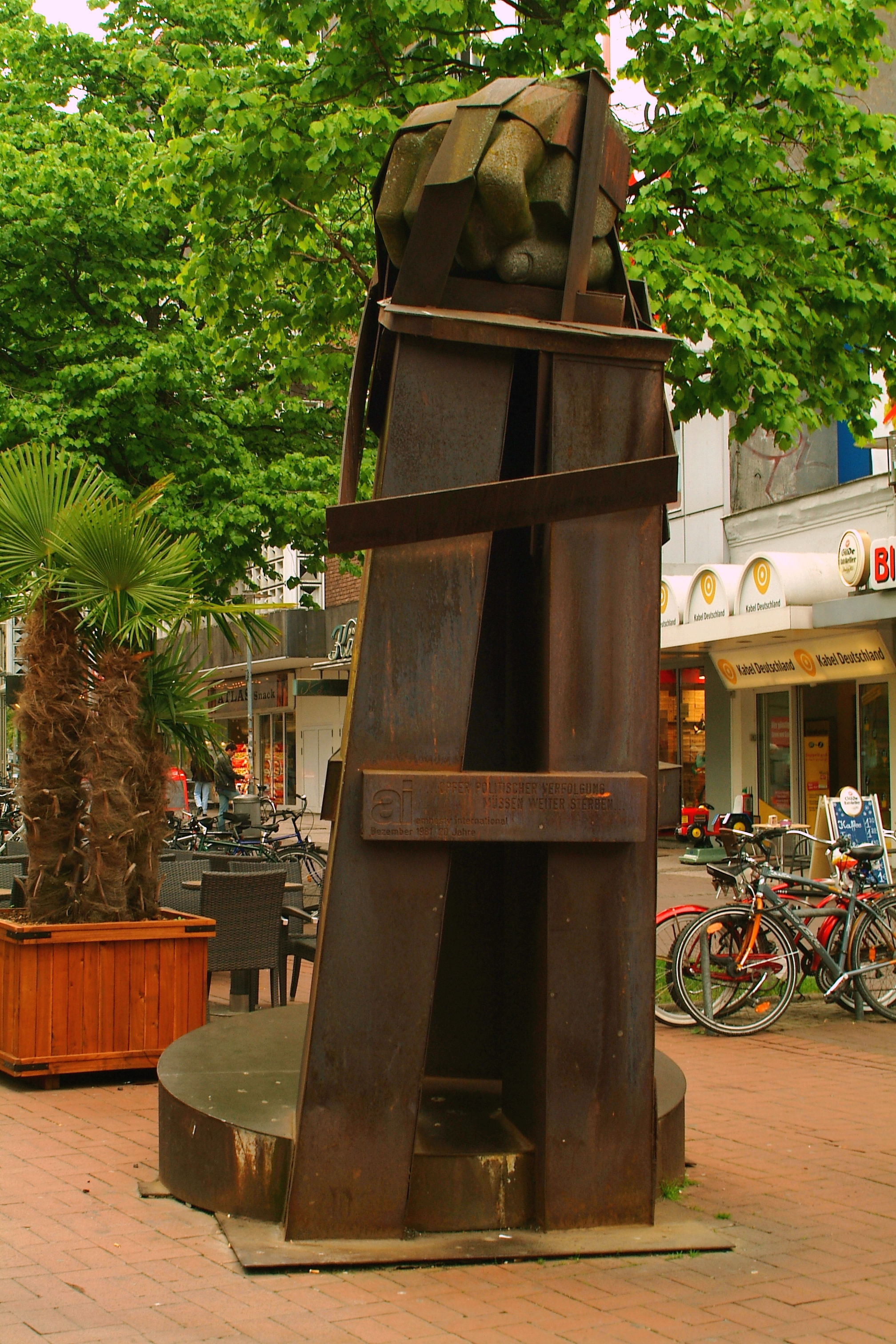 Bogside 69, gesehen von vorne